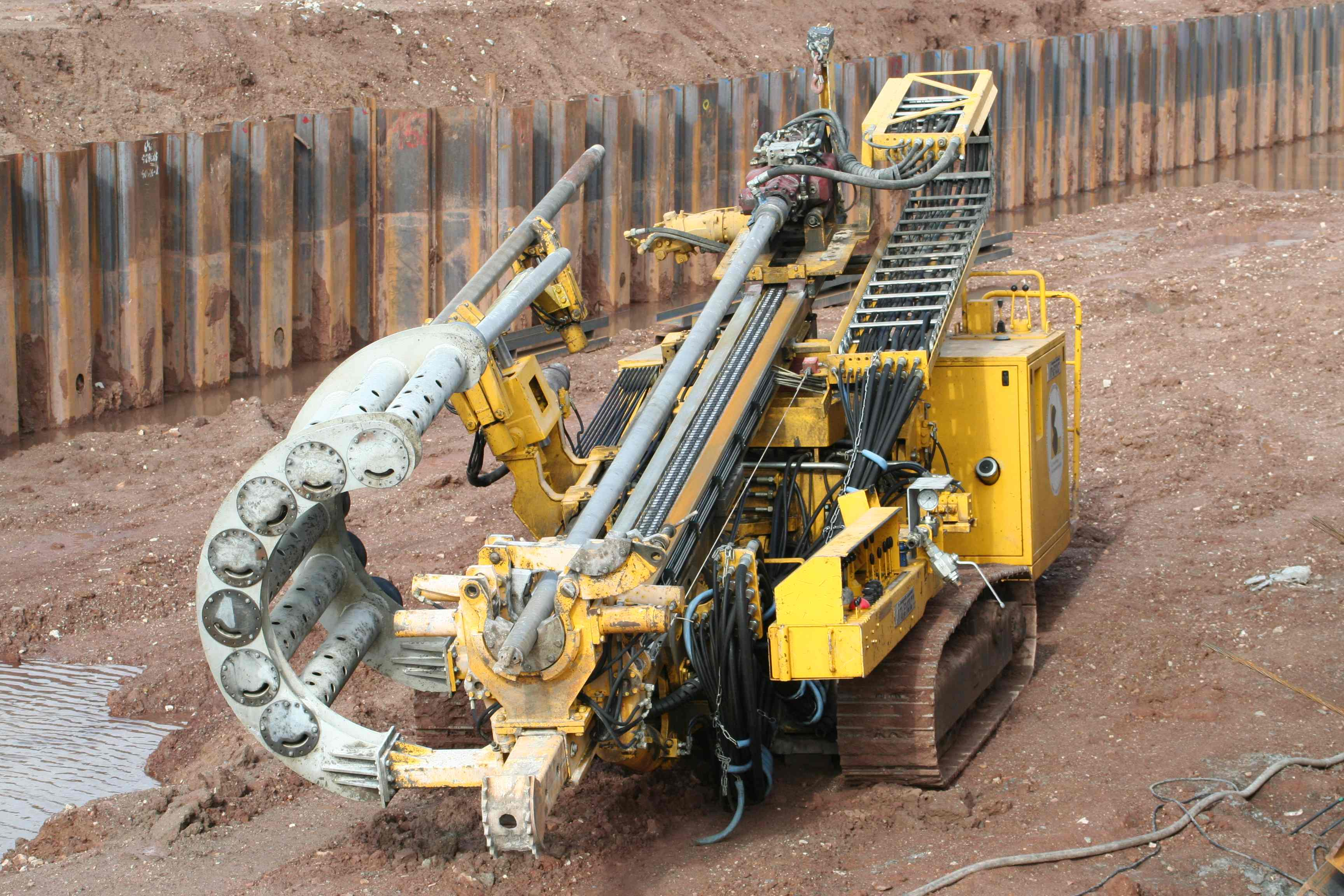 Ankerbohrgerät (anchor boring rig) mit Gestängemagazin zum Bohren der Löcher für das Setzen von Verpressankern